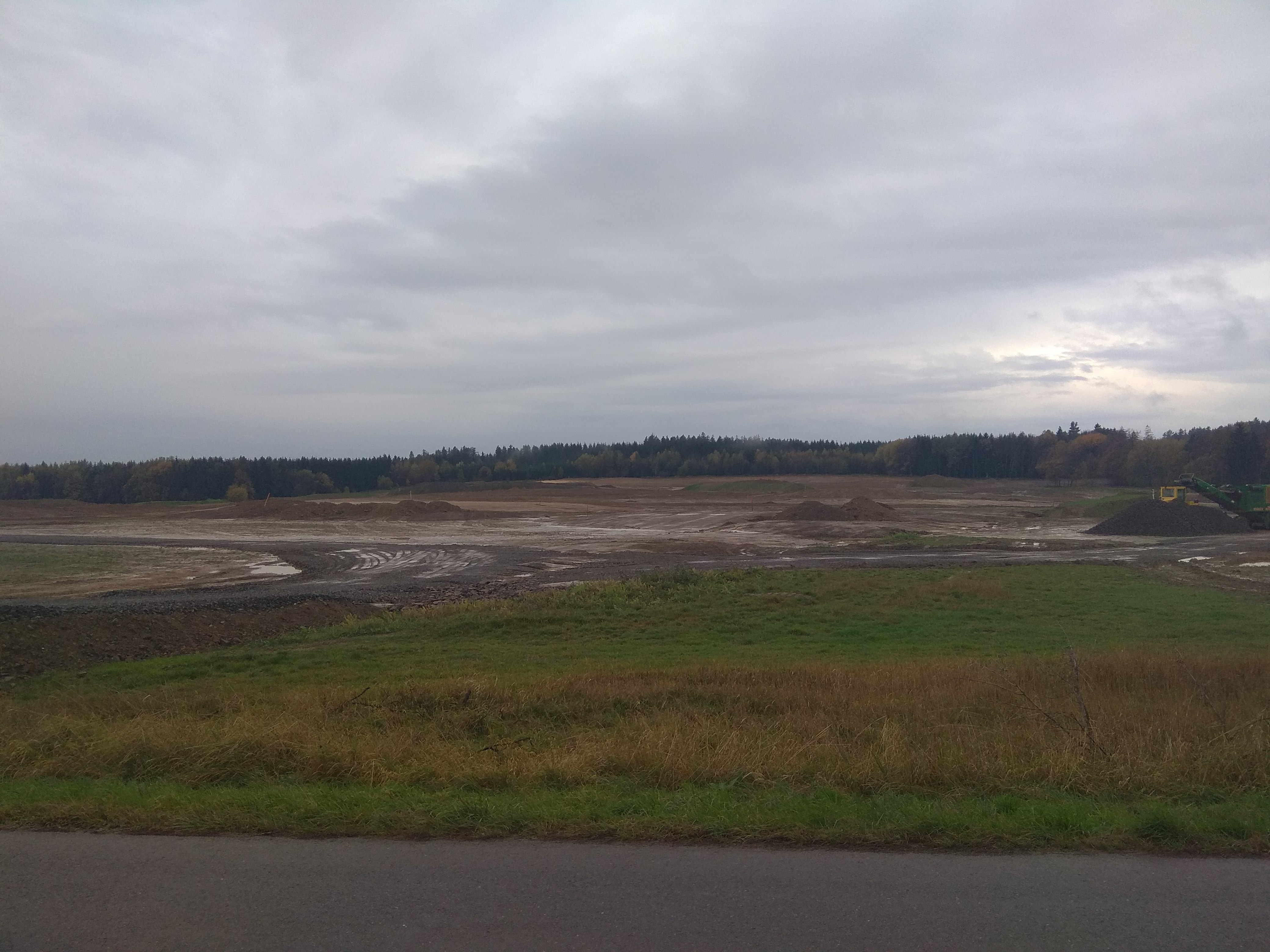 Výstavba projektu Oaks Prague